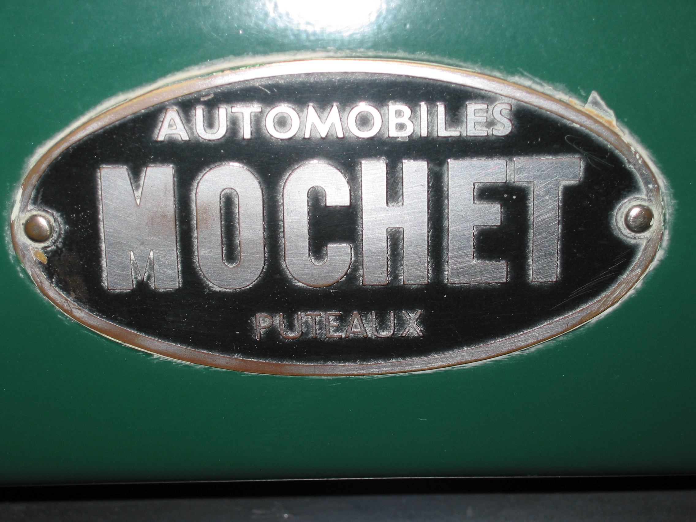 Emblem Mochet